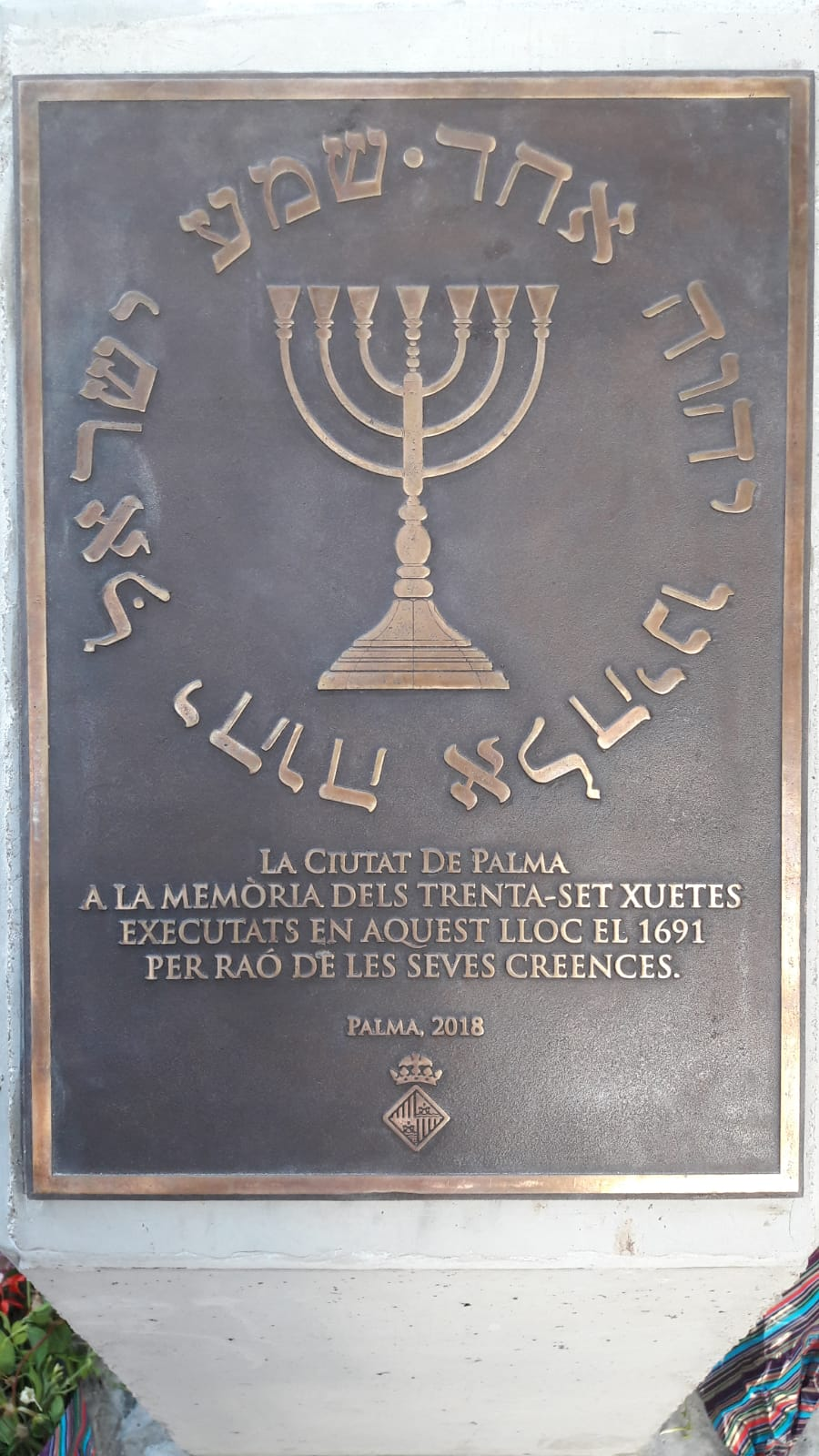 Memorial als xuetes